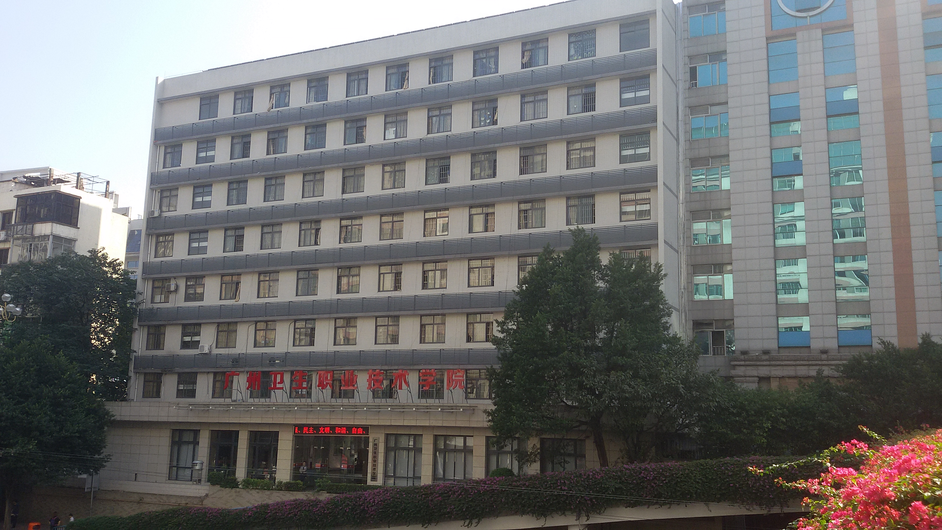 粵語: 廣州衛生職業技術學院（越秀校區）